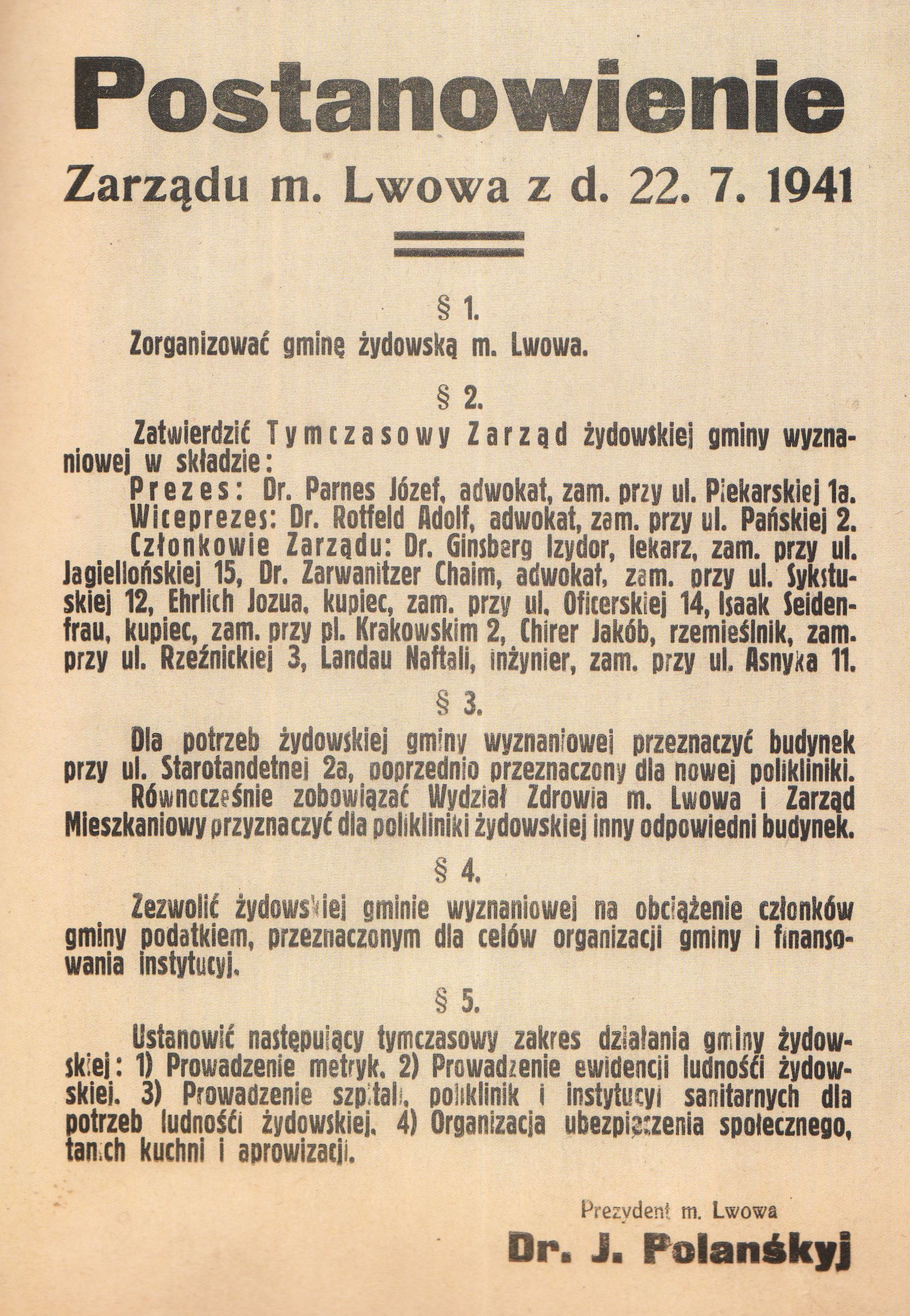 Postanowienie prezydenta Lwowa Jurija Polanskiego z 22 lipca 1941 o ustanowieniu Rady Żydowskiej